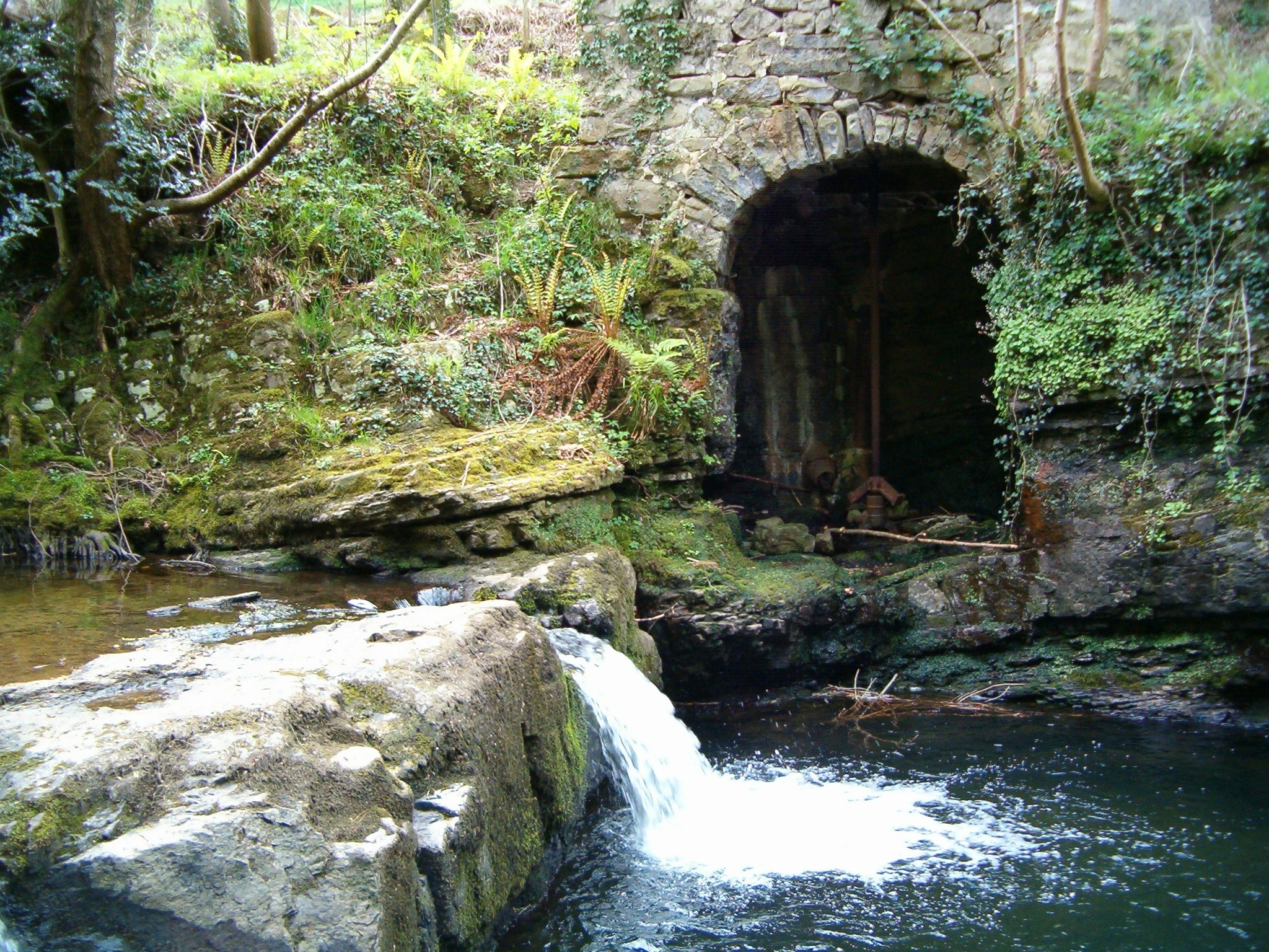 Tramo del río Pisueña (Cantabria) en su parte alta.